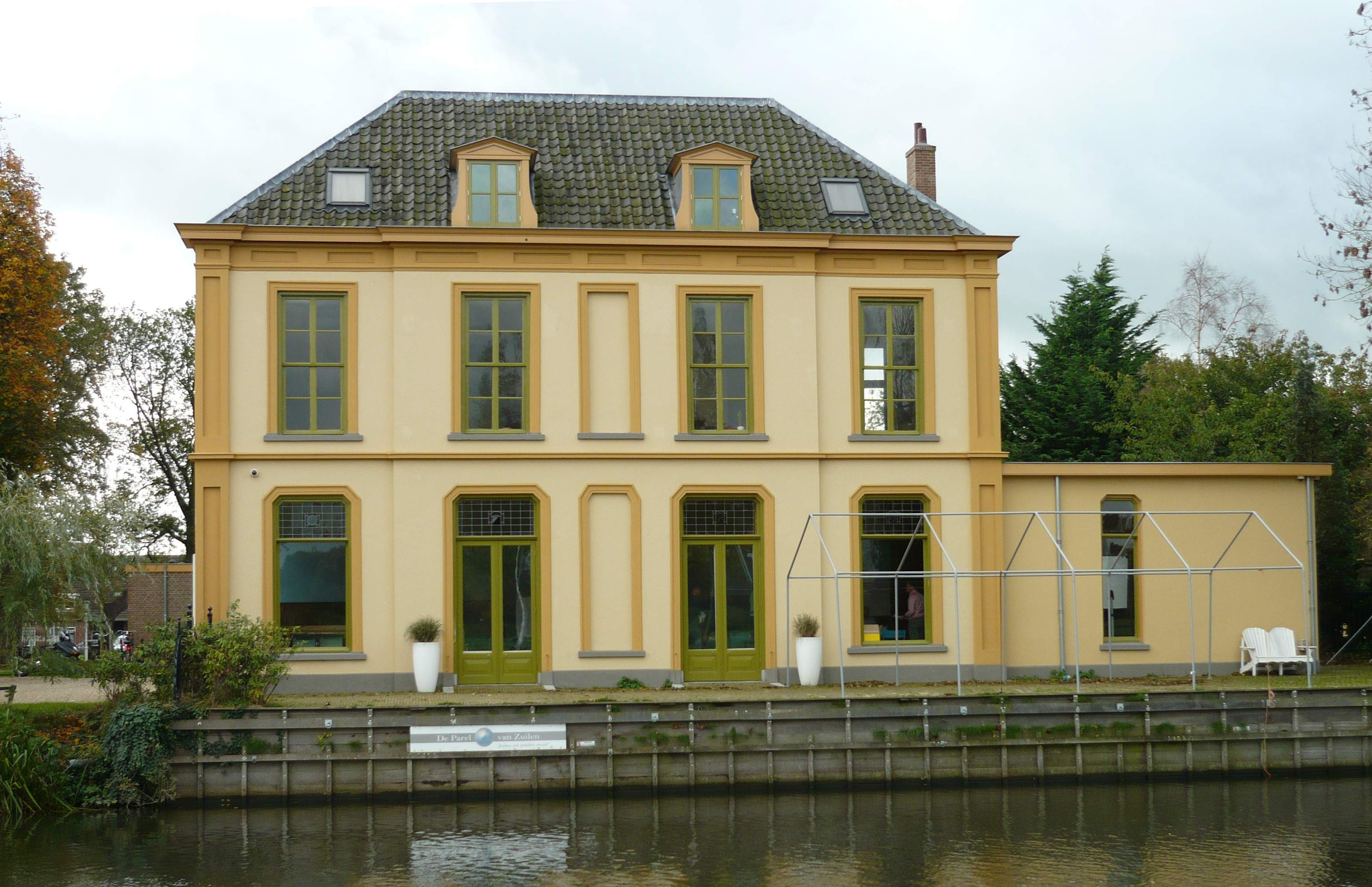 Buitenhuis Daelwijck te Utrecht, o.a. tussen ca. 1929 en 1954 gemeentehuis van de toenmalige gemeente Zuilen.